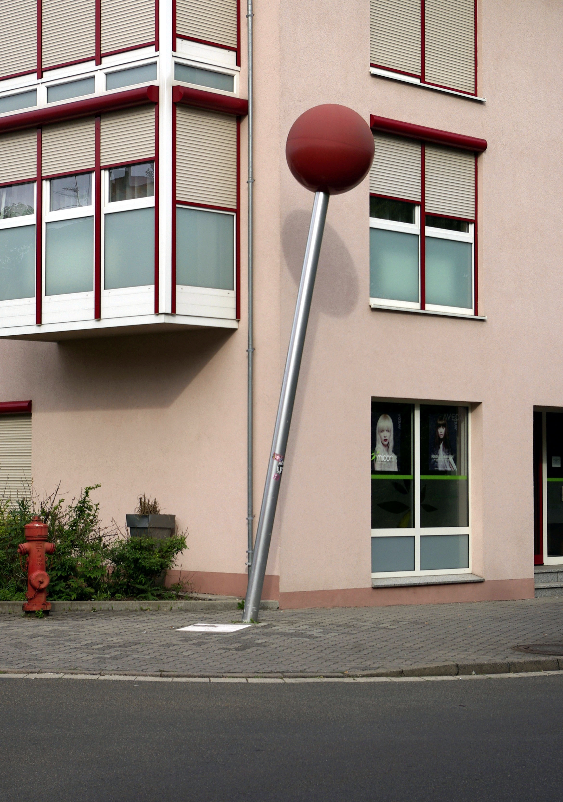 Erlanger Stecknadel des Projekts Denkmal-Objekte der Künstlerin Isi Kunath. Standort 1: Veste Erlangen am Fuchsengarten.